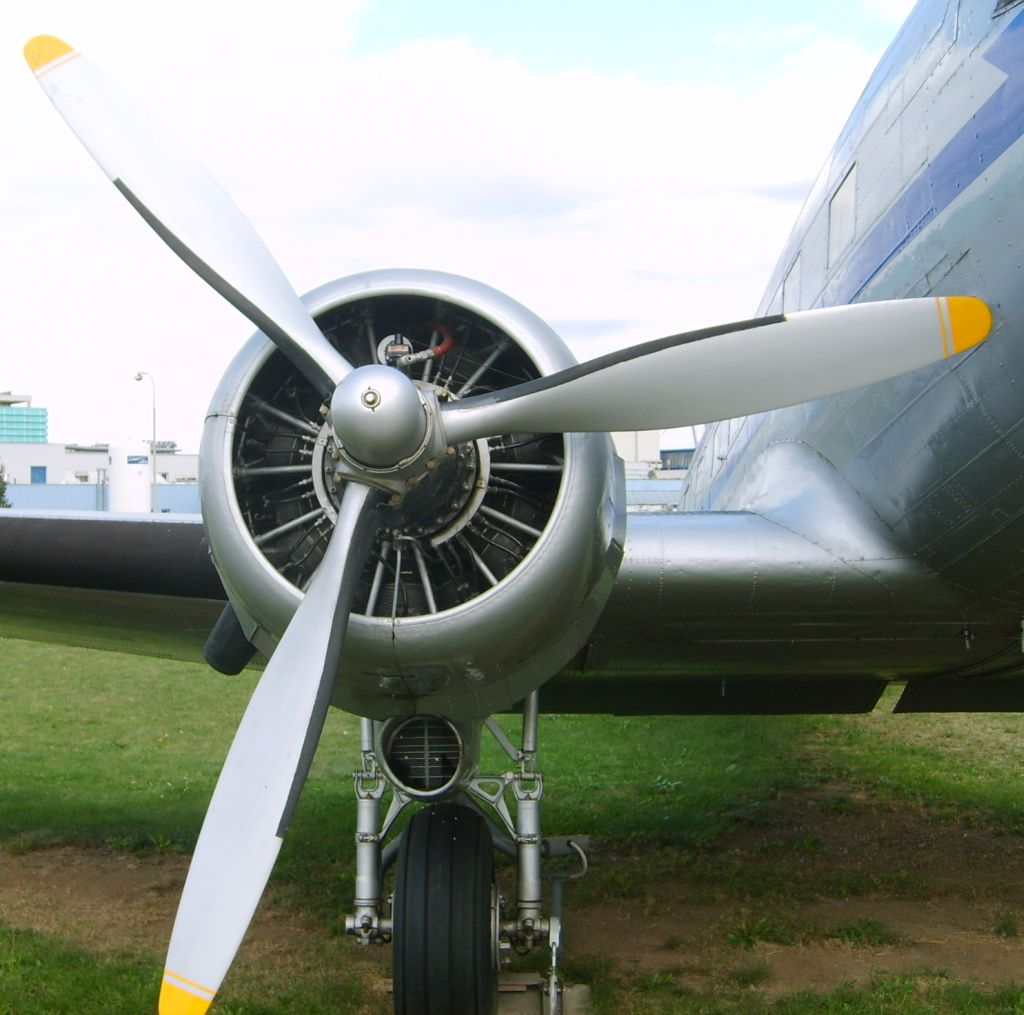 stermotor van een DC-3